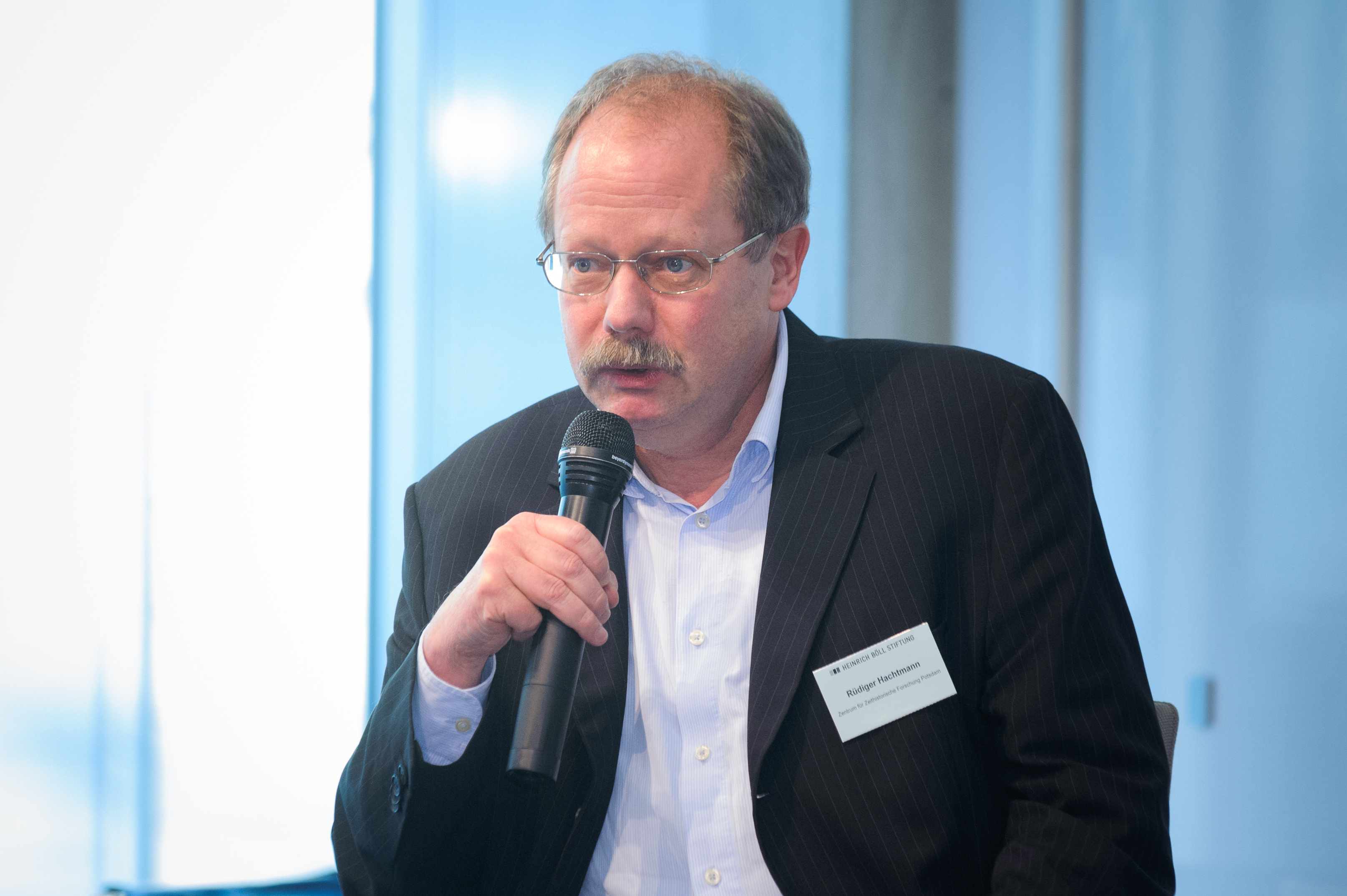 Prof. Dr. Rüdiger Hachtmann (Projektleiter am Zentrum für Zeithistorische Forschung Potsdam und Professor an der TU Berlin) Konferenz 1848 und Europa Foto: Stephan Röhl